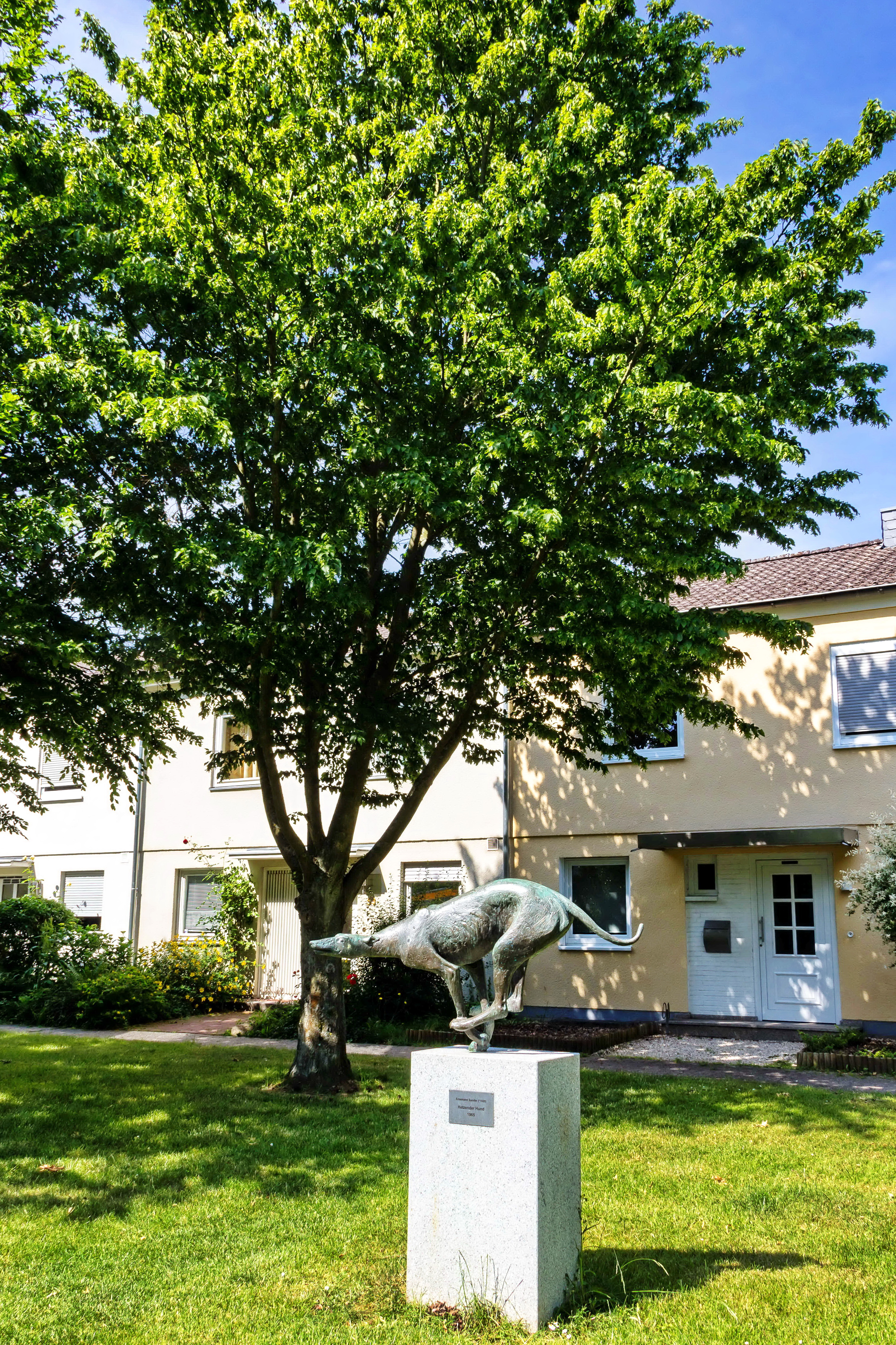 Hetzender Hund; Die bronzene Skulptur von Ernemann Sander aus dem Jahr 1971 befindet sich auf dem Bonner Heiderhof. Der scheinbar fliegende Windhund ist auf einem Sockel aus Muschelkalk befestigt.